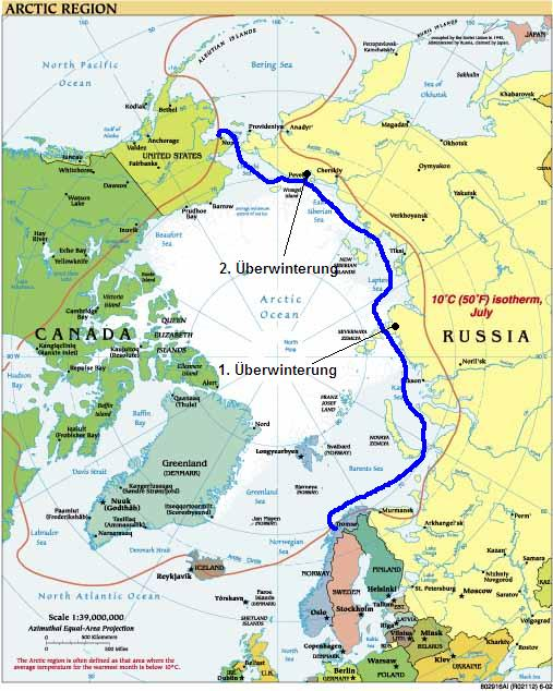 Amundsens Nordostpassagenexpedition 1918-1920